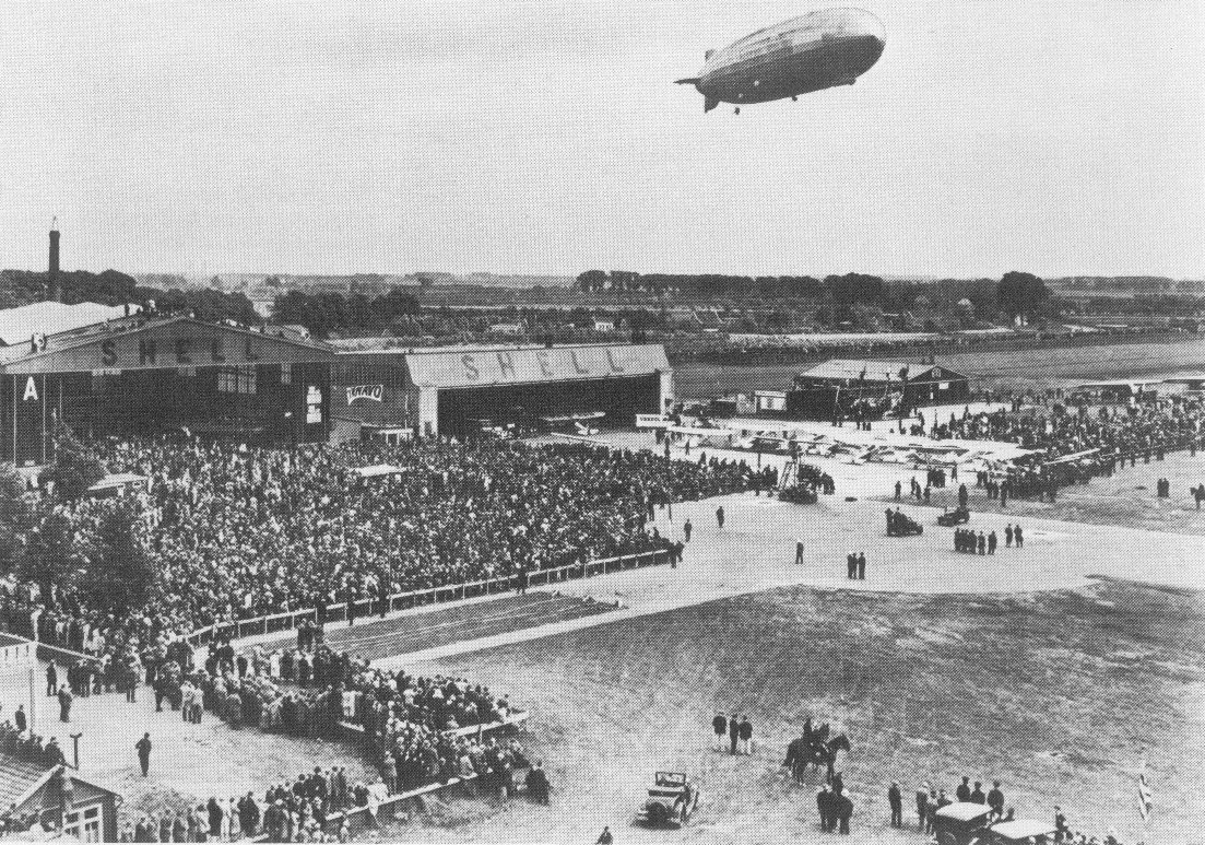 Vliegveld Waalhaven in Rotterdam met Graf Zeppelin